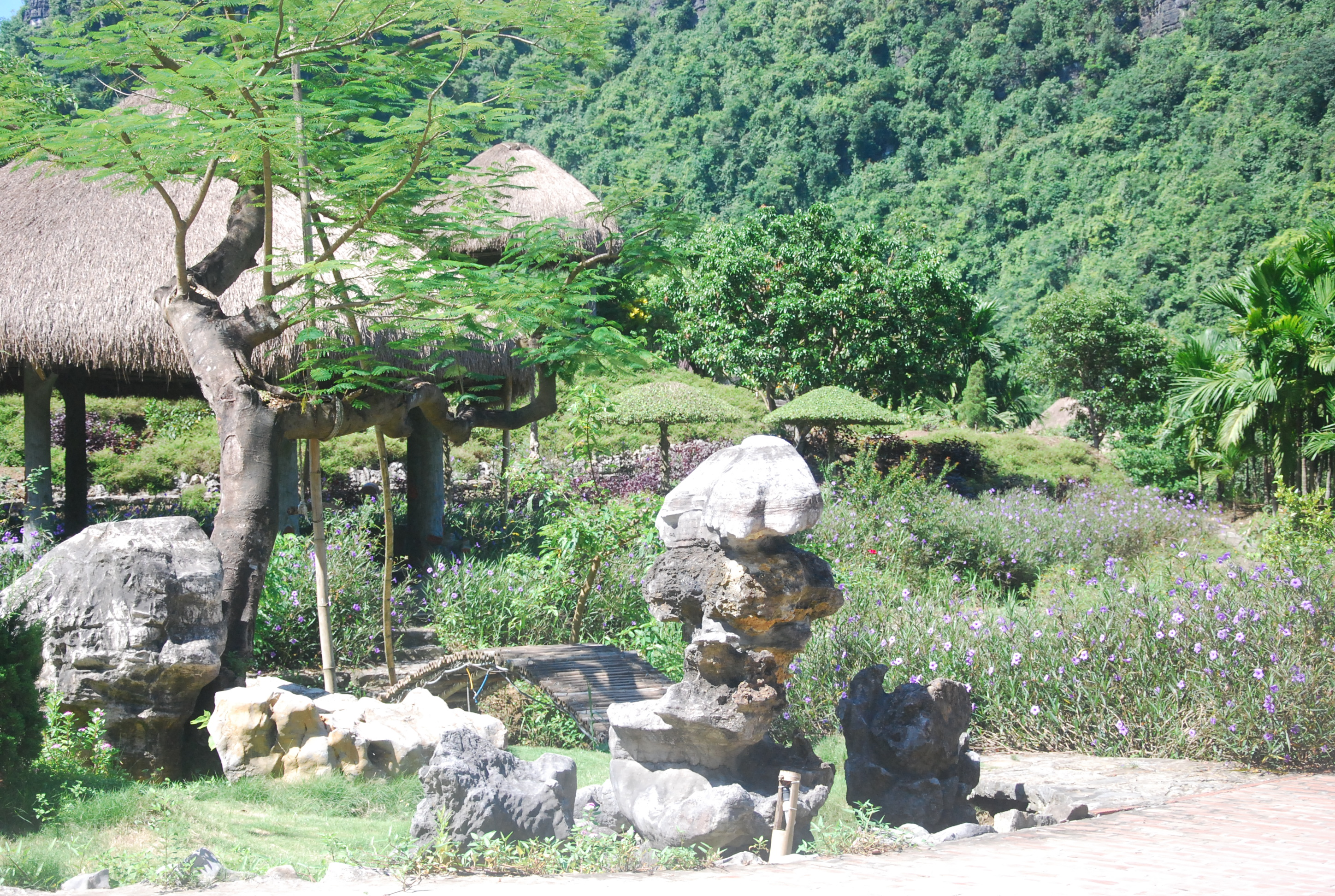 Phong cảnh Khu du lịch sinh thái Thung Nham ở Ninh Bình